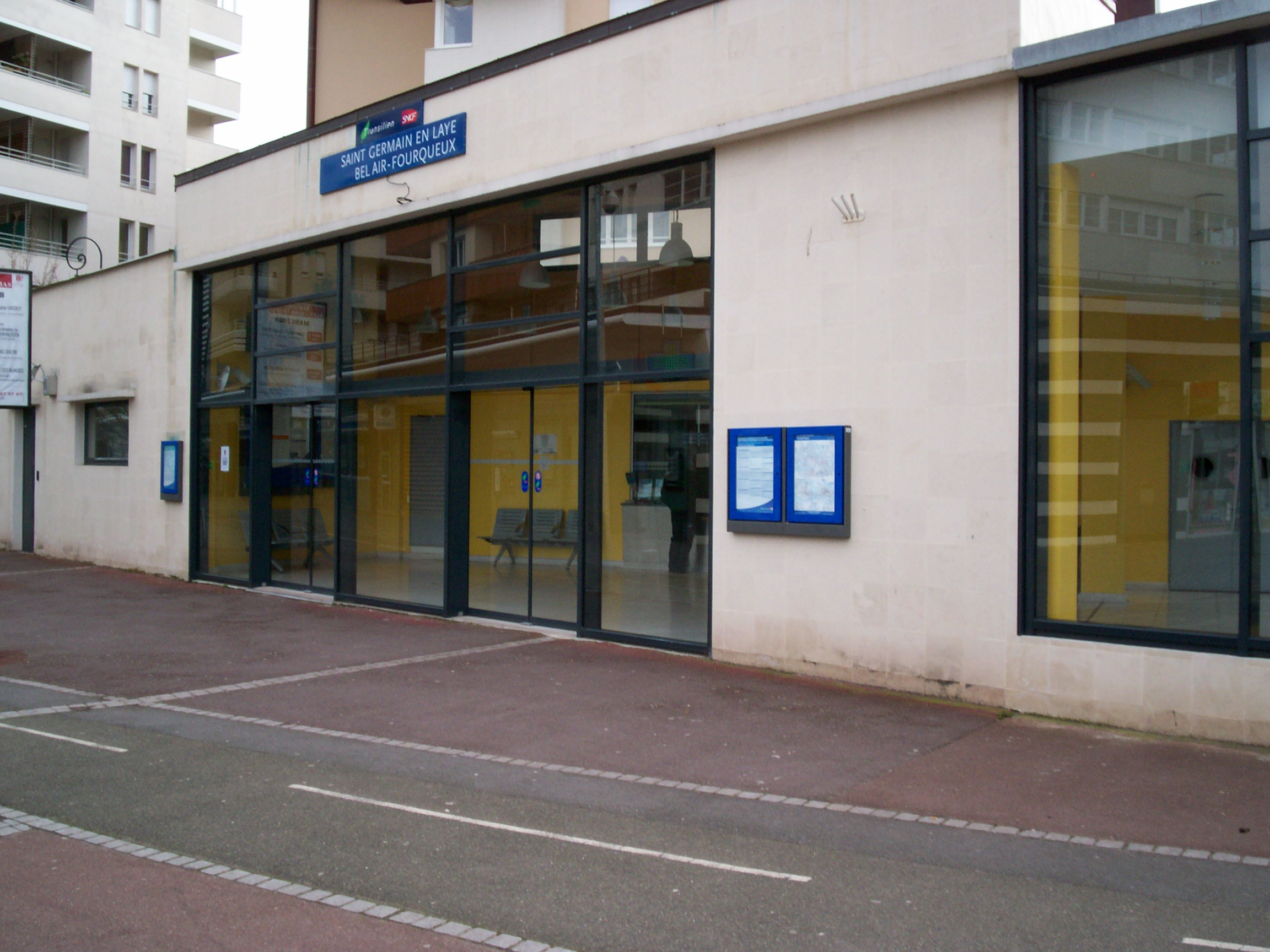 Bâtiment Voyageurs de Saint-Germain - Bel Air - Fourqueux